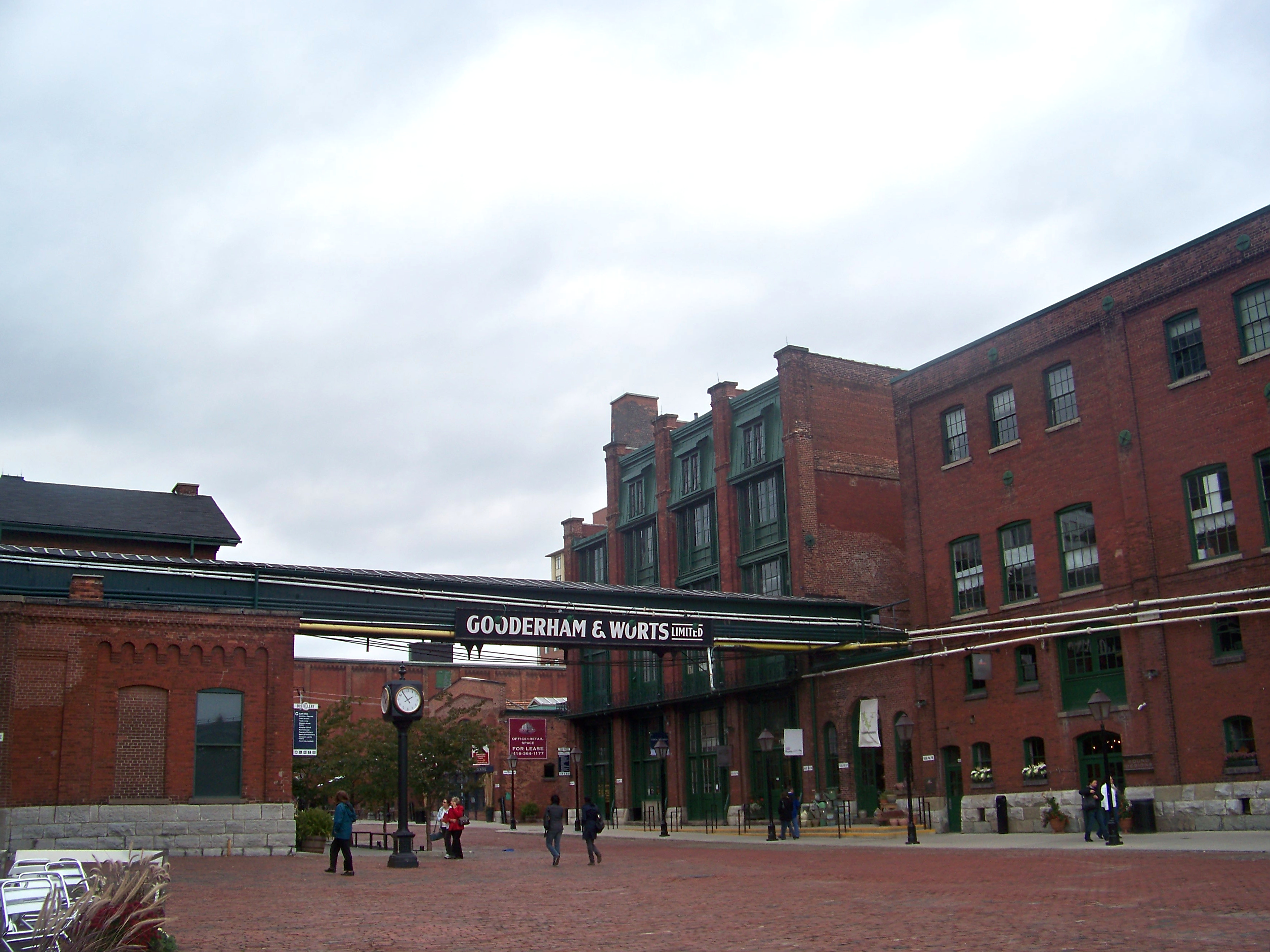 Distillerie Gooderham and Worts,Toronto,Ontario,Canada.